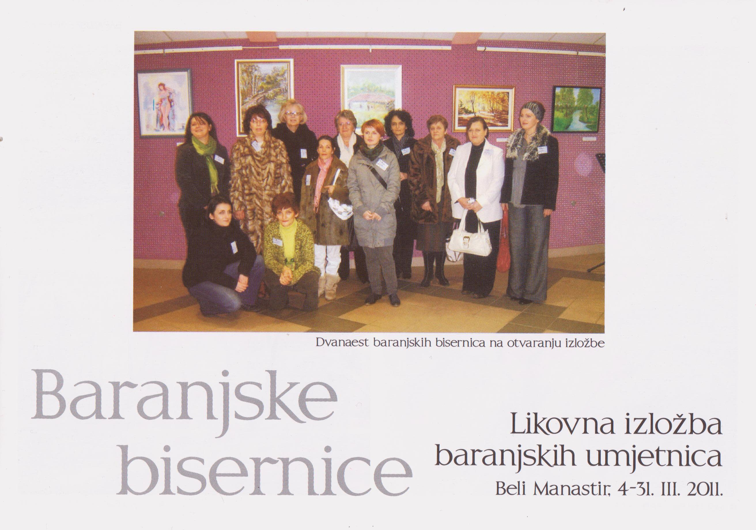 Baranjske bisernice (katalog izložbe), Mirovna grupa Oaza Beli Manastir, 2011, ISBN 978-953-95299-6-1